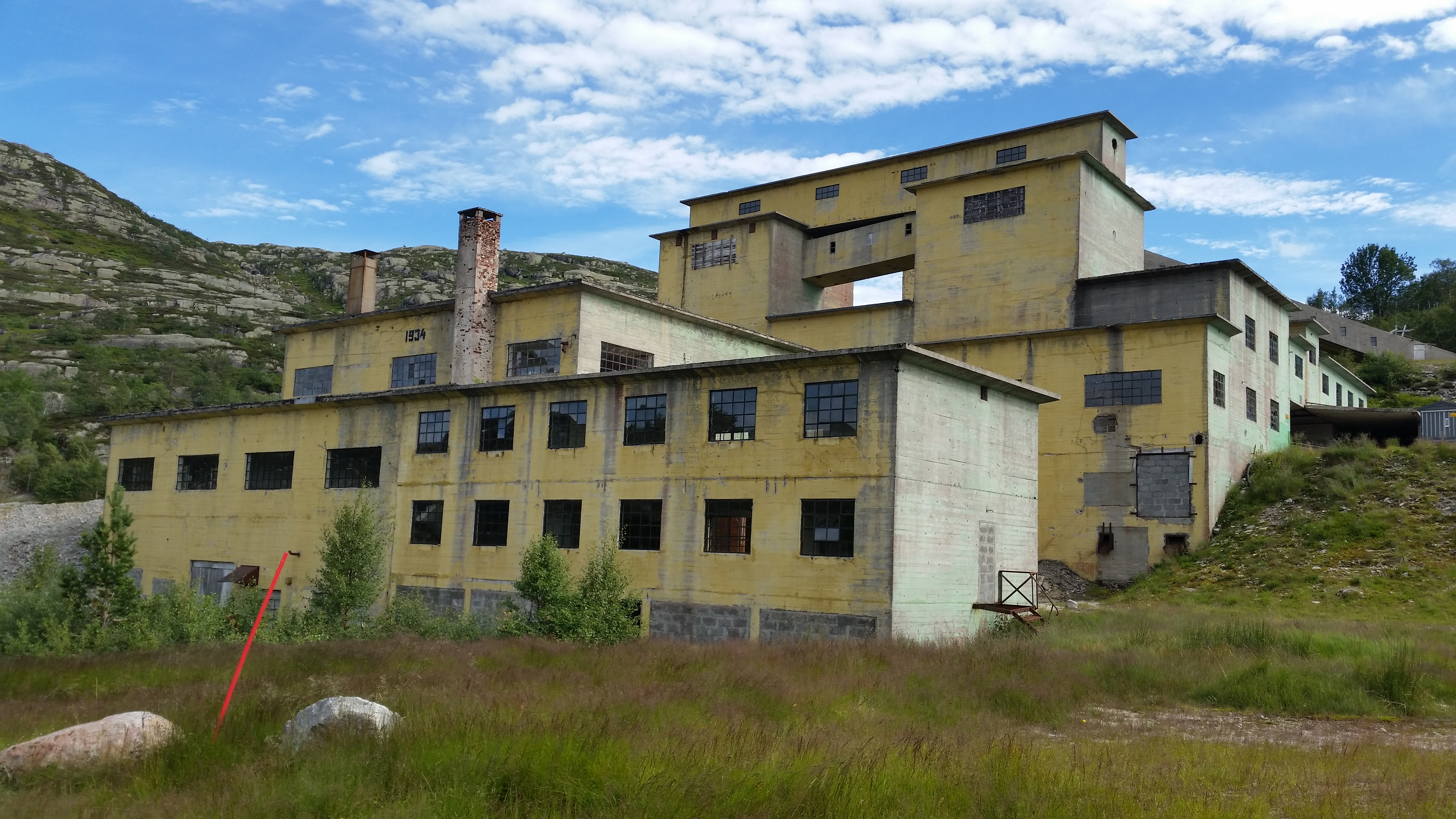 Gruvebygg og vaskeri